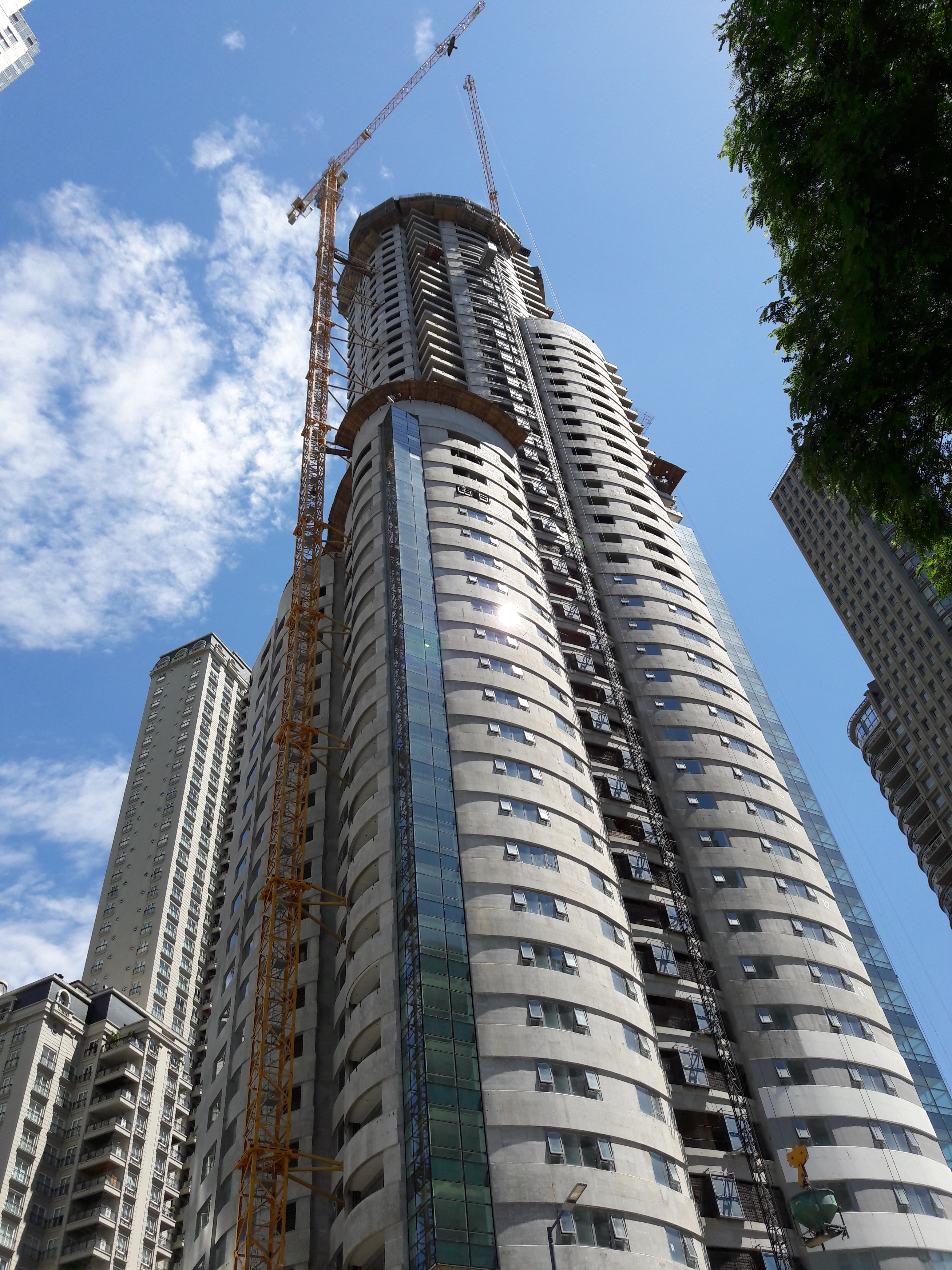 Alvear Tower en construcción en enero de 2017.